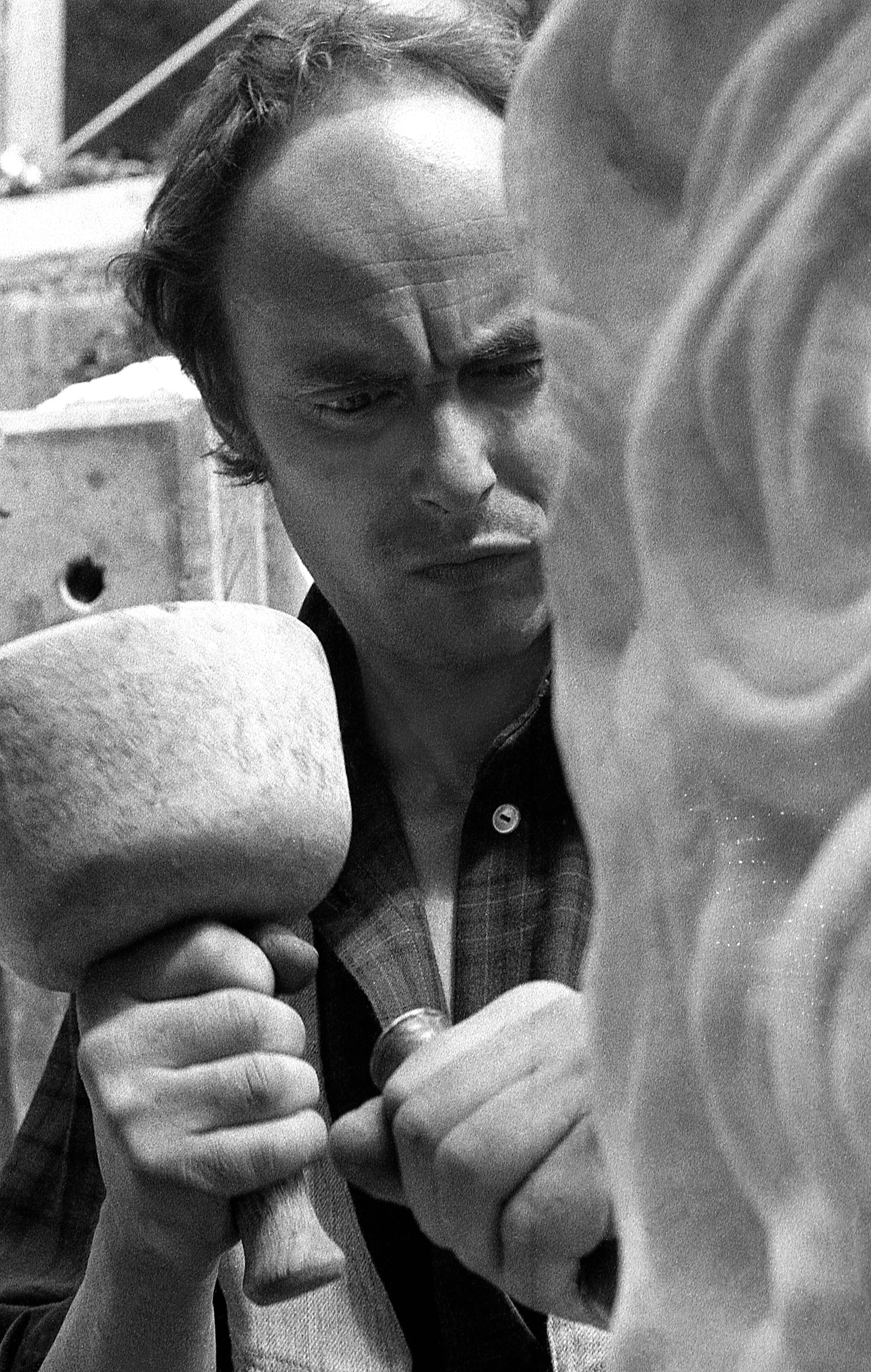 Bildhauer